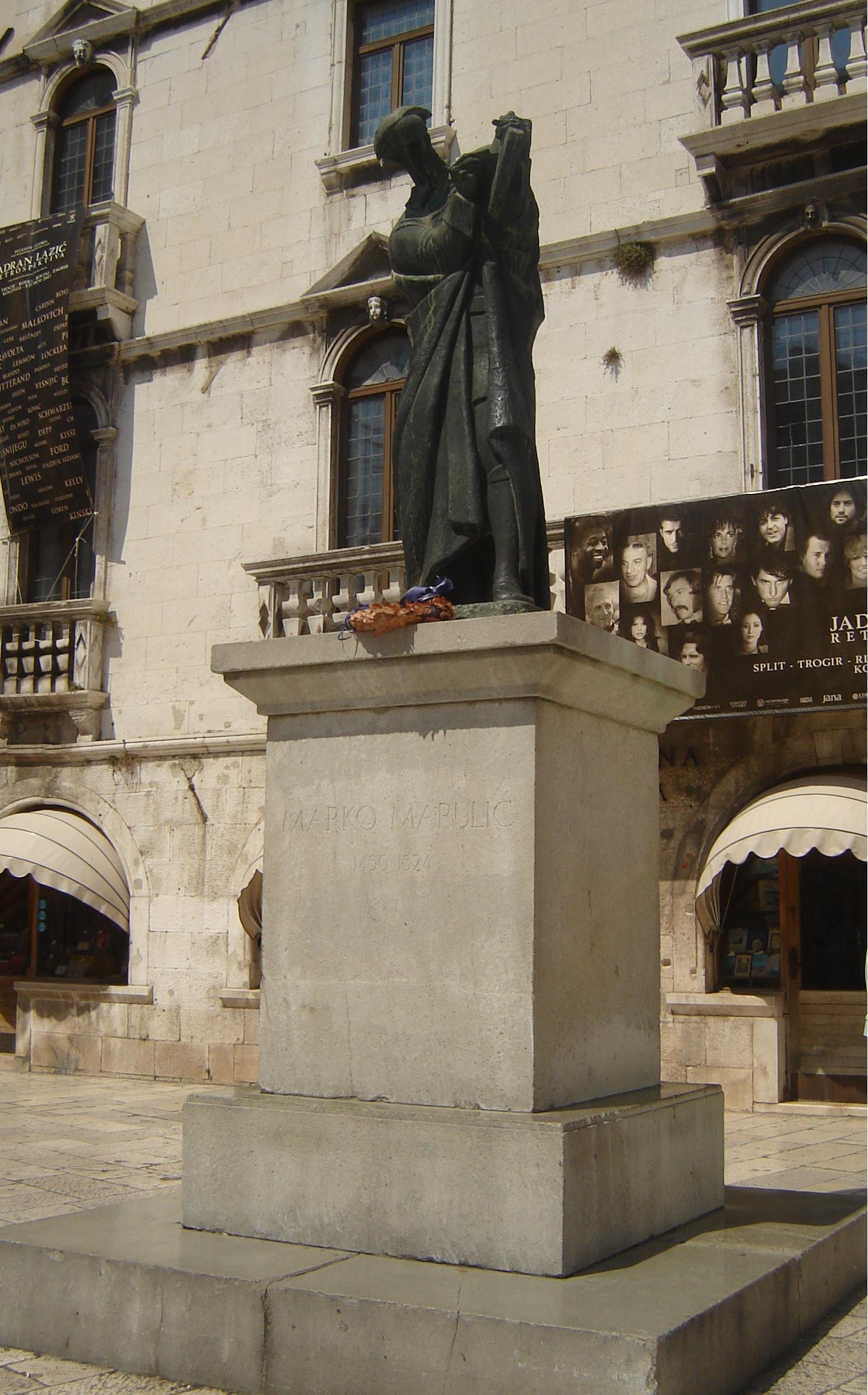 Споменик Марку Марулићу, Сплит, 2007.